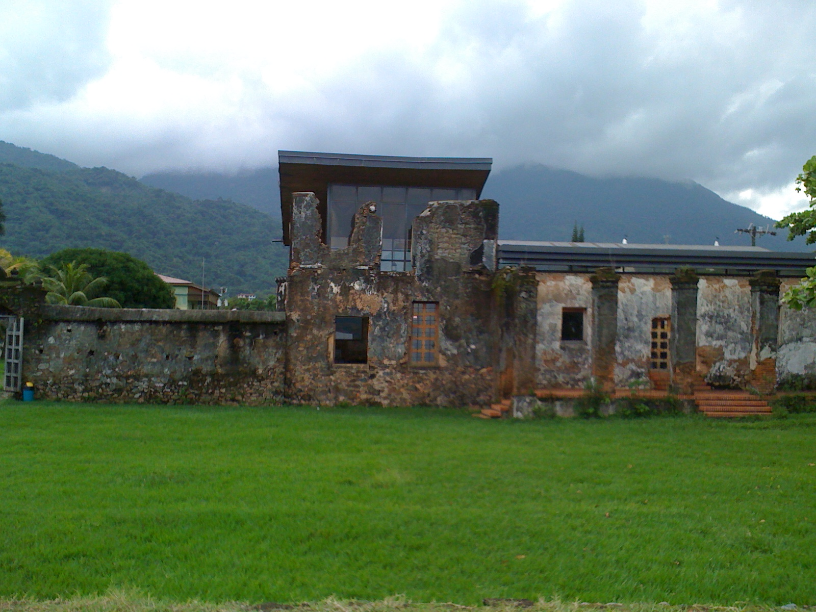 FORTALEZA SANTA BARBARA